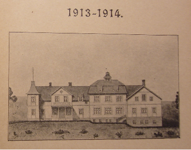 omslag på skolans verksamhetsberättelse 1913-1914